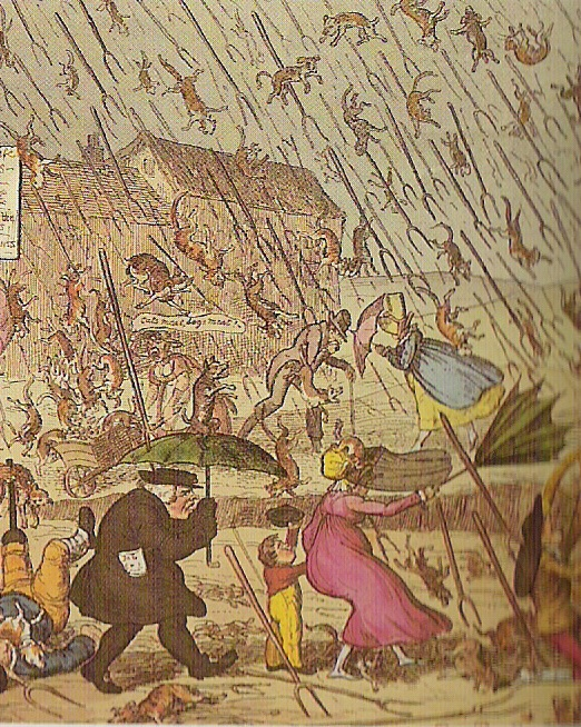 imagen taken from the french Wikipedia at [1]. History follows:(suppr) (actu) 16 juillet 2006 à 15:45 . . Aliesin (Discuter | Contributions) . . 522×654 (265 884 octets) (Pluie de chats, chiens et fourches. Caricature anglaise du Template:XIXe siècle. Template:Domaine public) (suppr) (rétab) 16 juillet 2006 à 15:42 . . Aliesin (Discuter | Contributions) . . 654×522 (350 082 octets) (Pluie de chats, chiens et fourches. Caricature anglaise du Template:XIXe siècle )